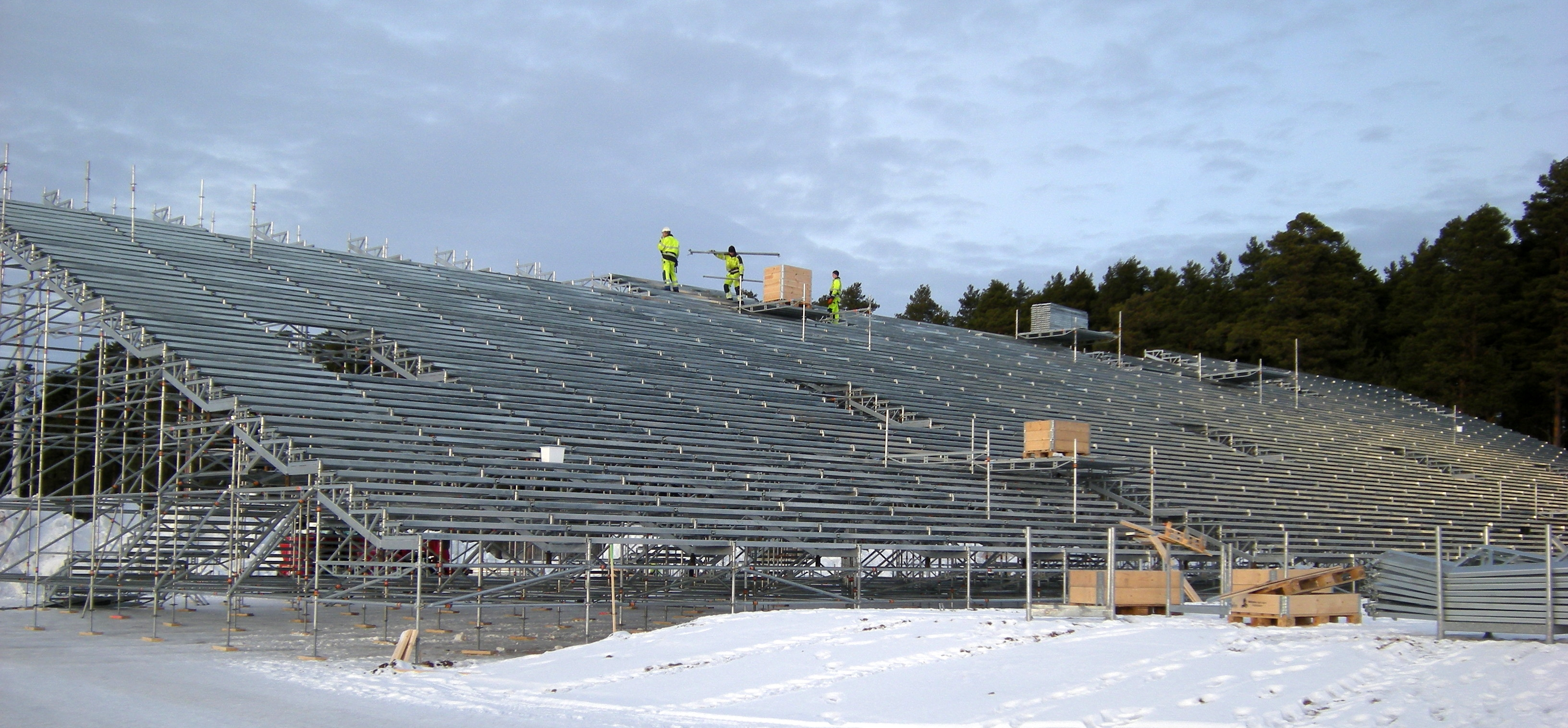 Tillfällig utomhusarena Villa Långbers i Leksand.